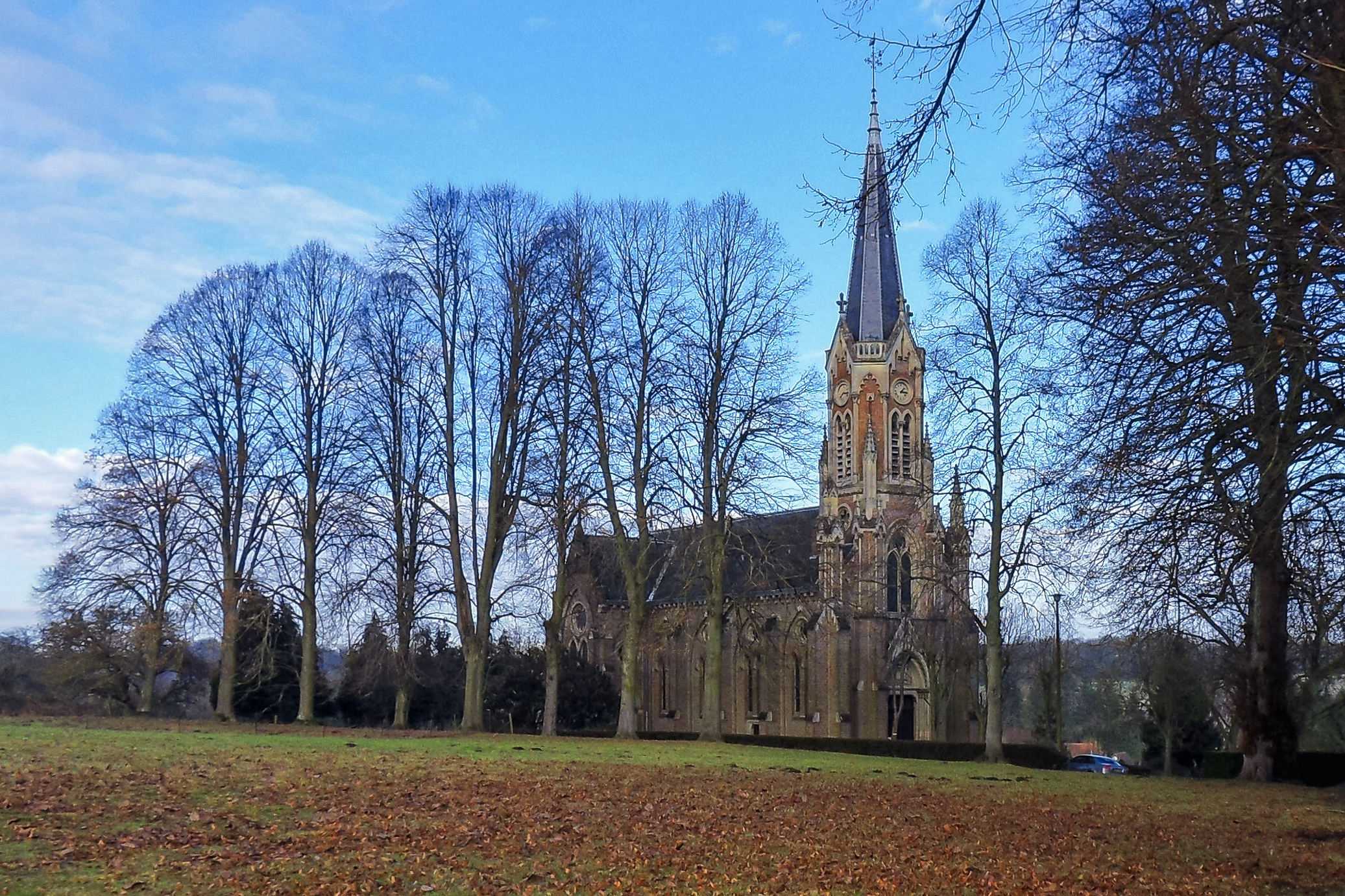 Vauchelles-lès-Domart (Somme, France). L'église aperçue depuis les environs de l'entrée du château.